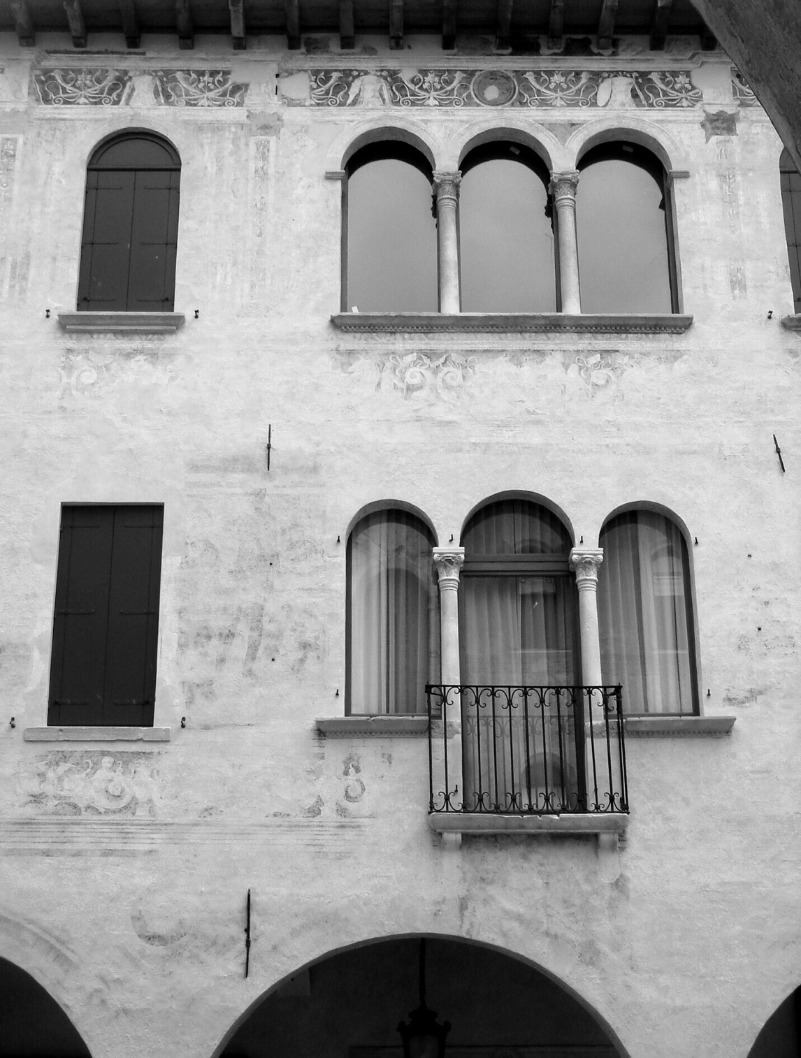 Conegliano (Treviso): Casa Colussi, particolare con le trifore e la facciata affrescata.